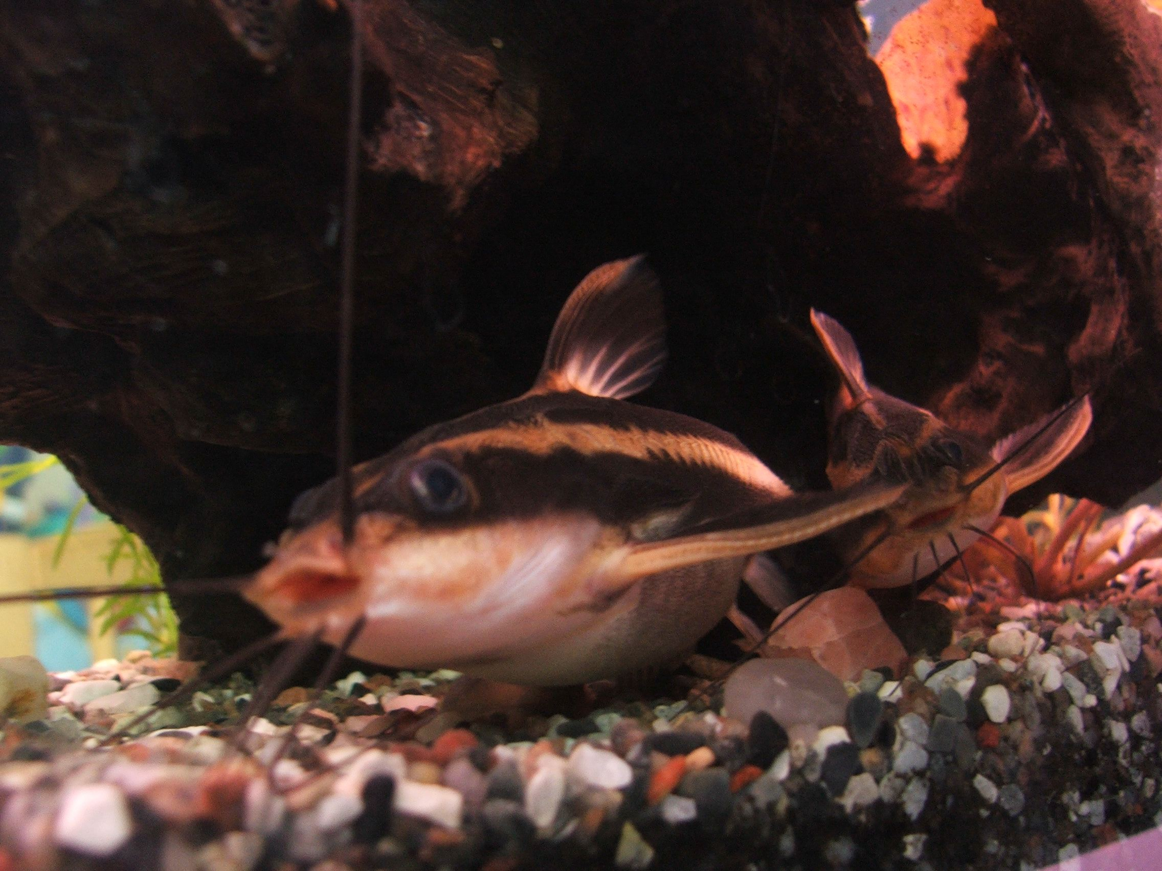 Platydoras costatus